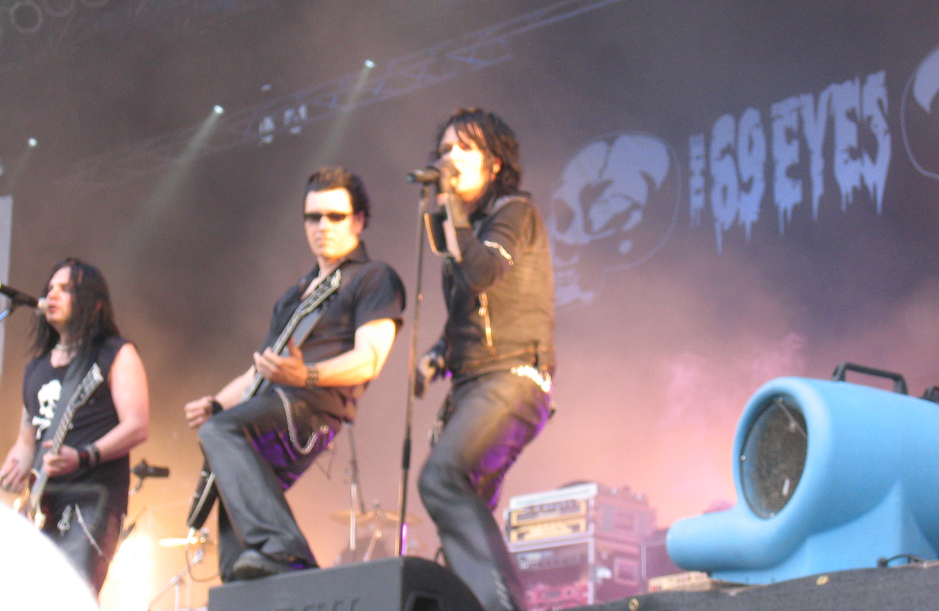 The 69 Eyes beim M'era Luna Festival 2005